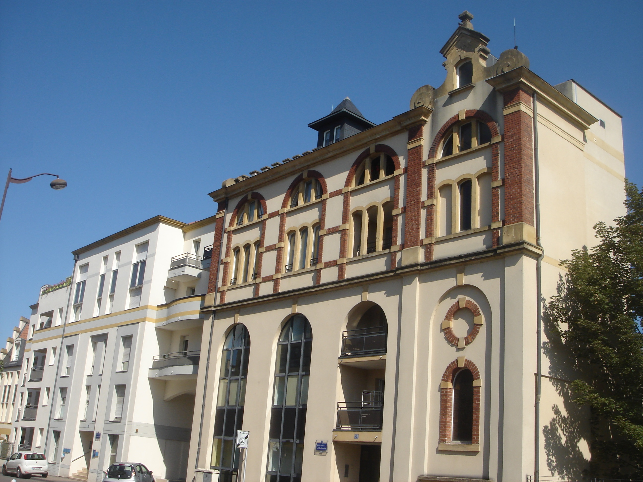 Le bâtiment (n°28) est une nouvelle résidence, le bâtiment (n°30) avait été conservé et rénové en résidence.